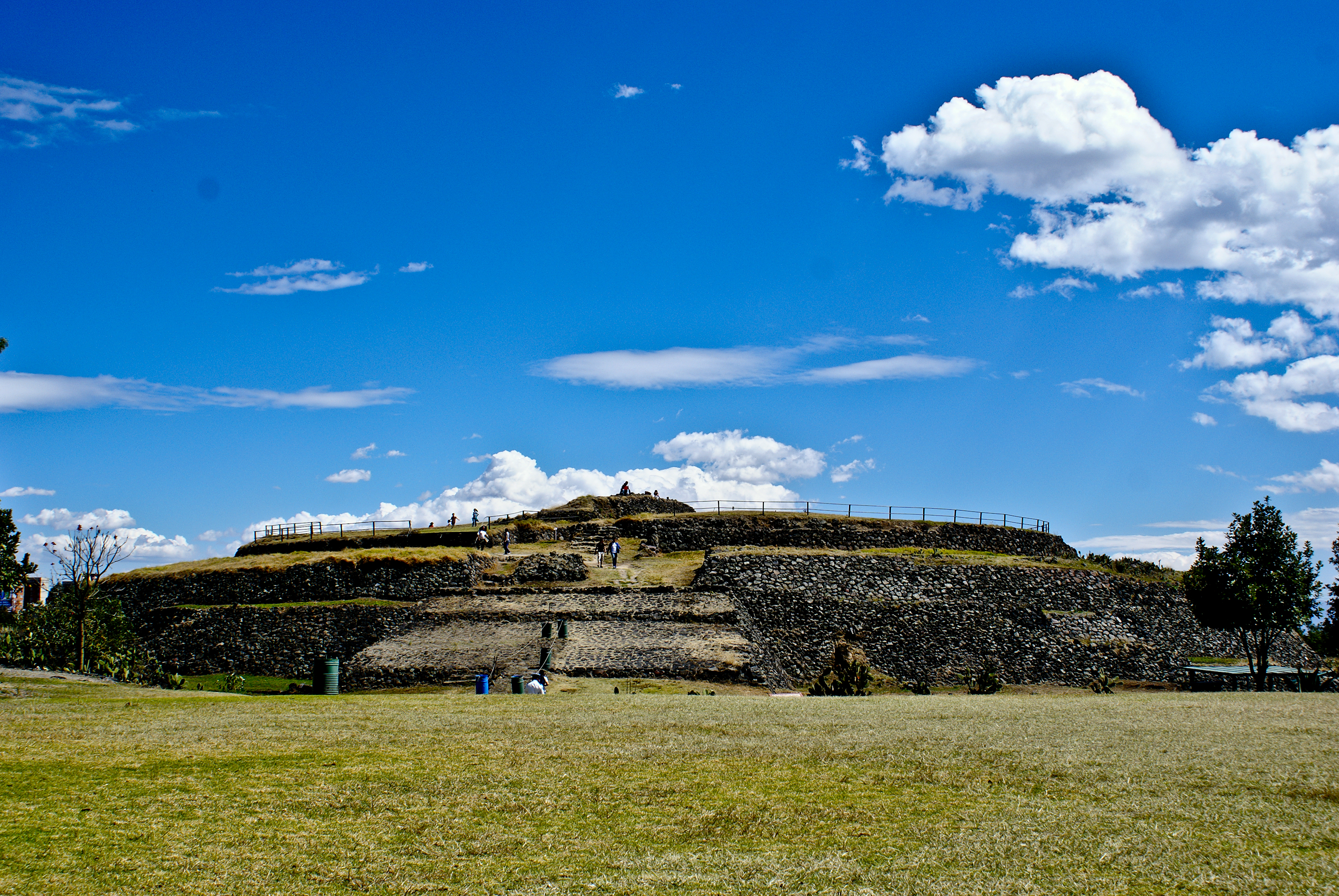 Pirámide de Cuicuilco, Tlalpan, D.F